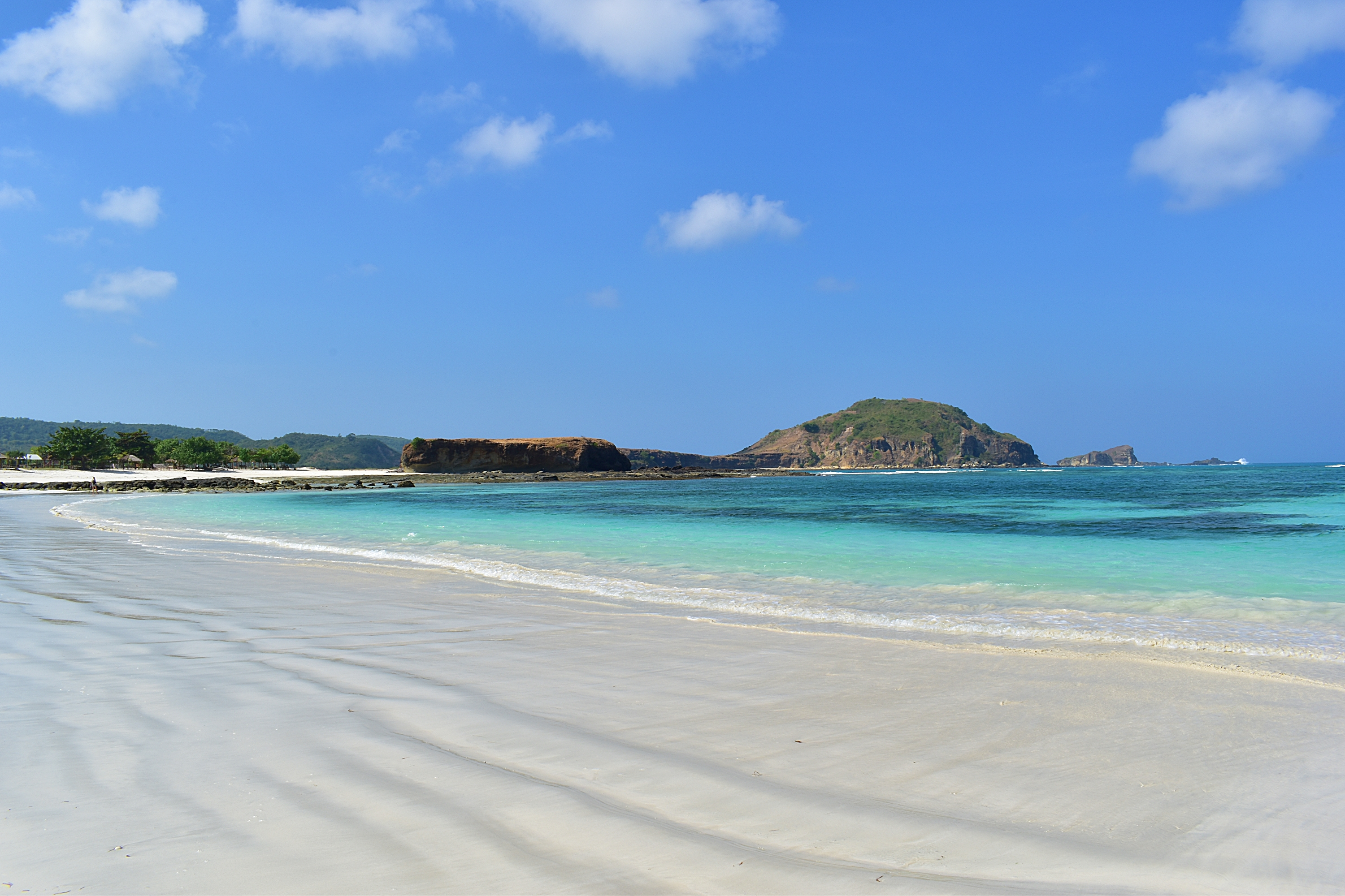 foto ini saya abadikan karena terpesona dengan perpaduan antara pasir putih dan birunya air laut dari pantai tanjung aan.